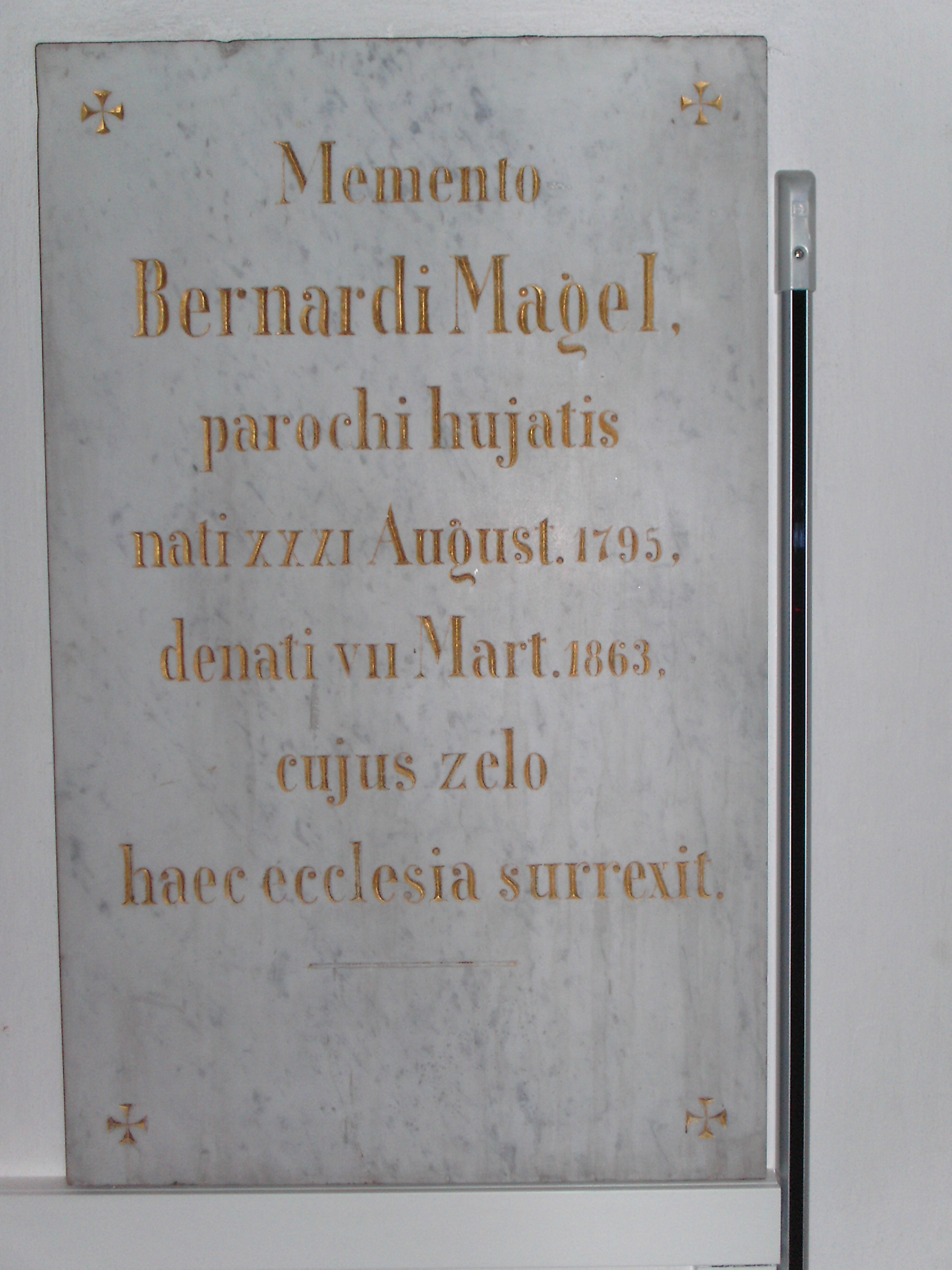 Gedenktafel für Pf. Bernhard Magel, Marienkirche Neustadt/Weinstraße